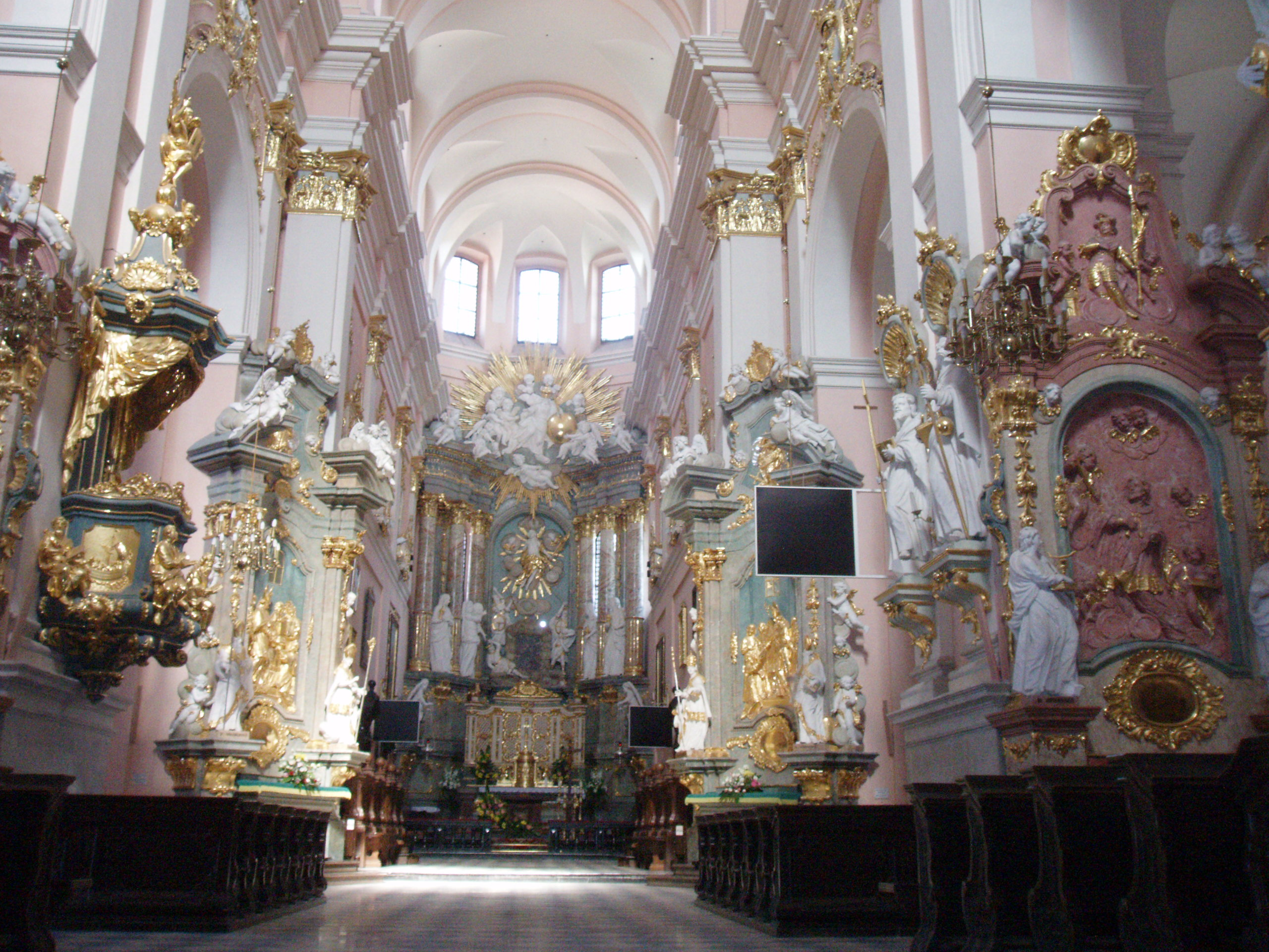 Miechów, kościół, ob. parafialny pw. Grobu Pańskiego, XIII/XIV, XVIII